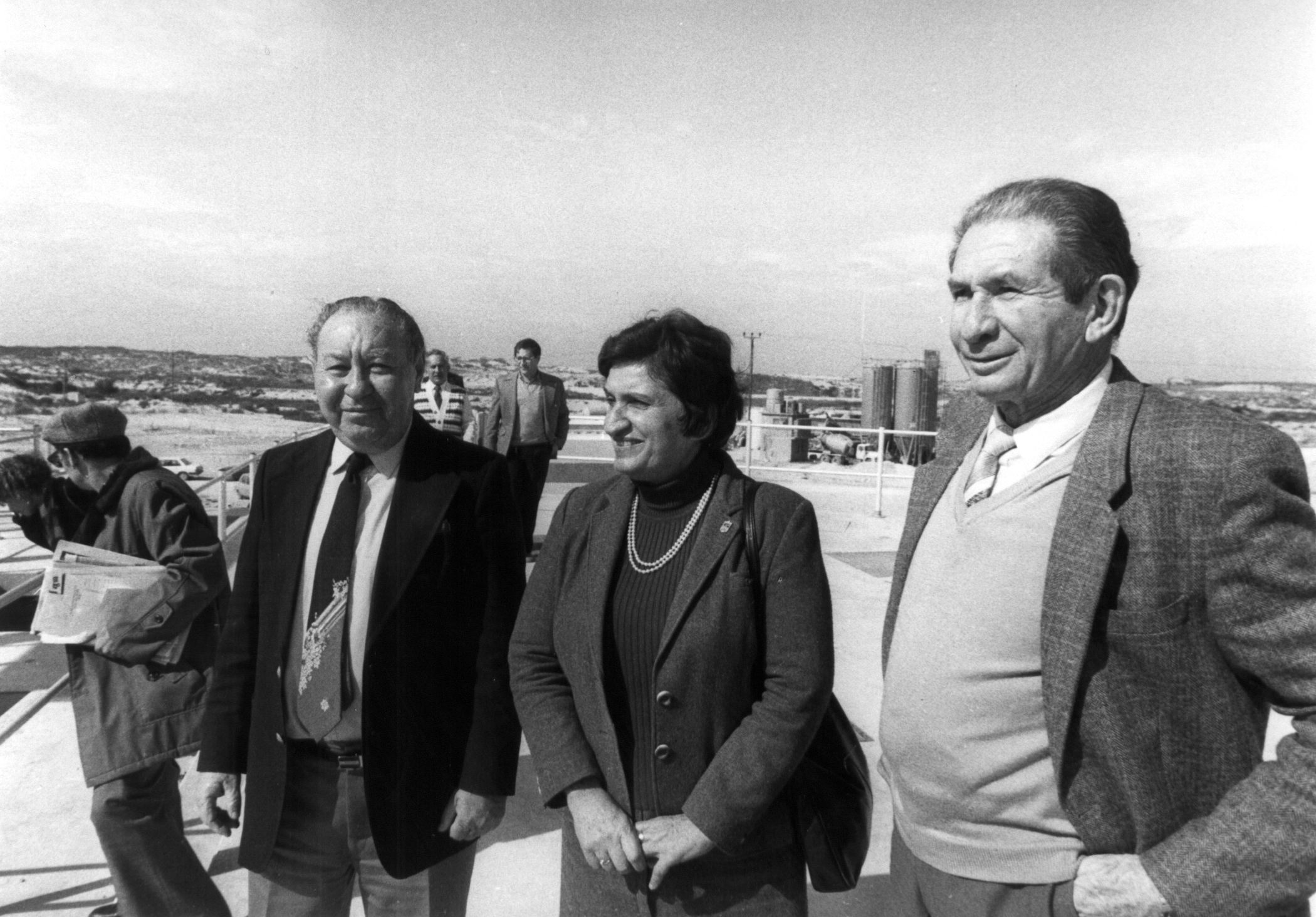 שרת הבריאות שושנה ארבלי אלמוזנינו מבקרת את מפעל השפדן